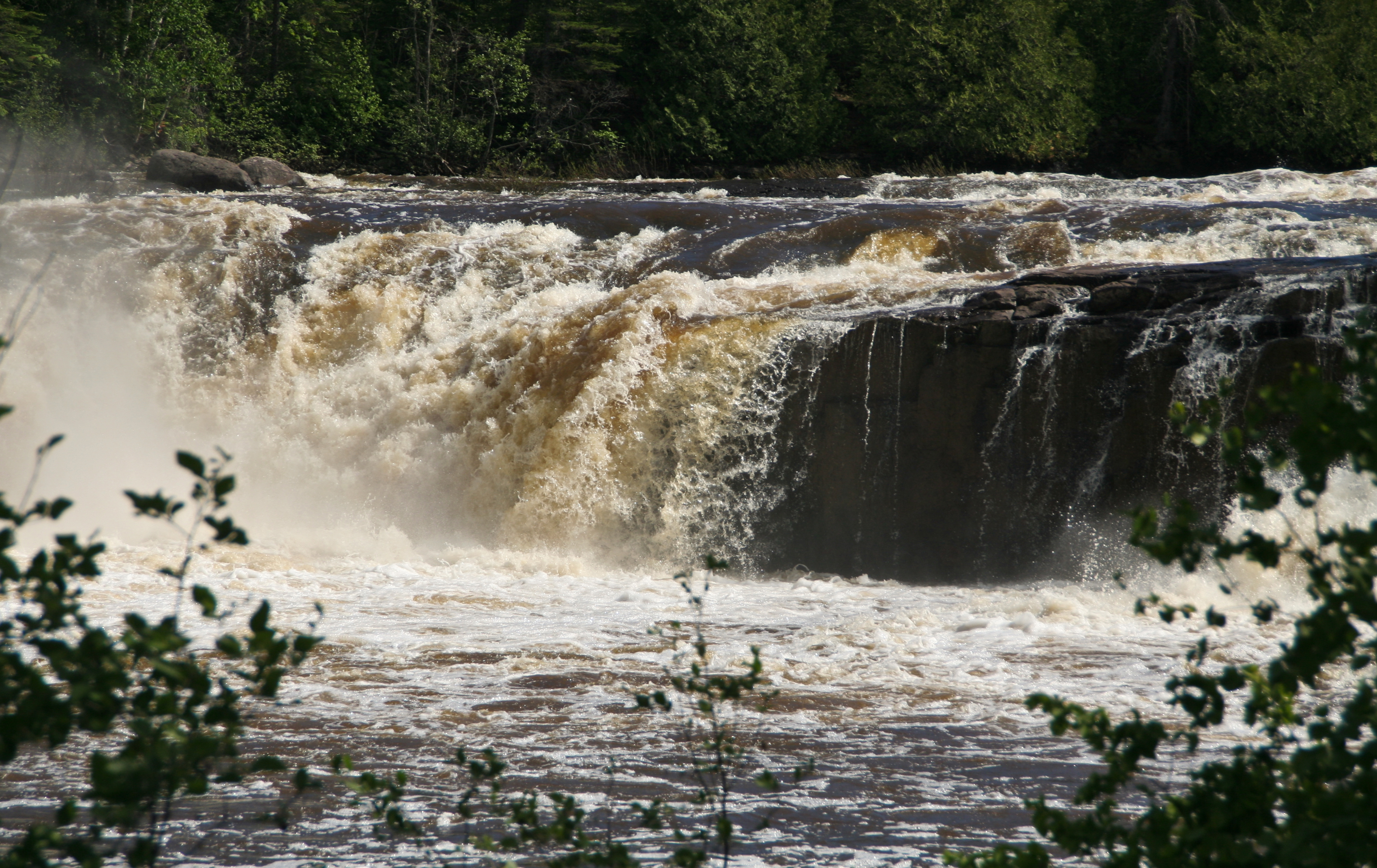 Pigeon River Middle Falls